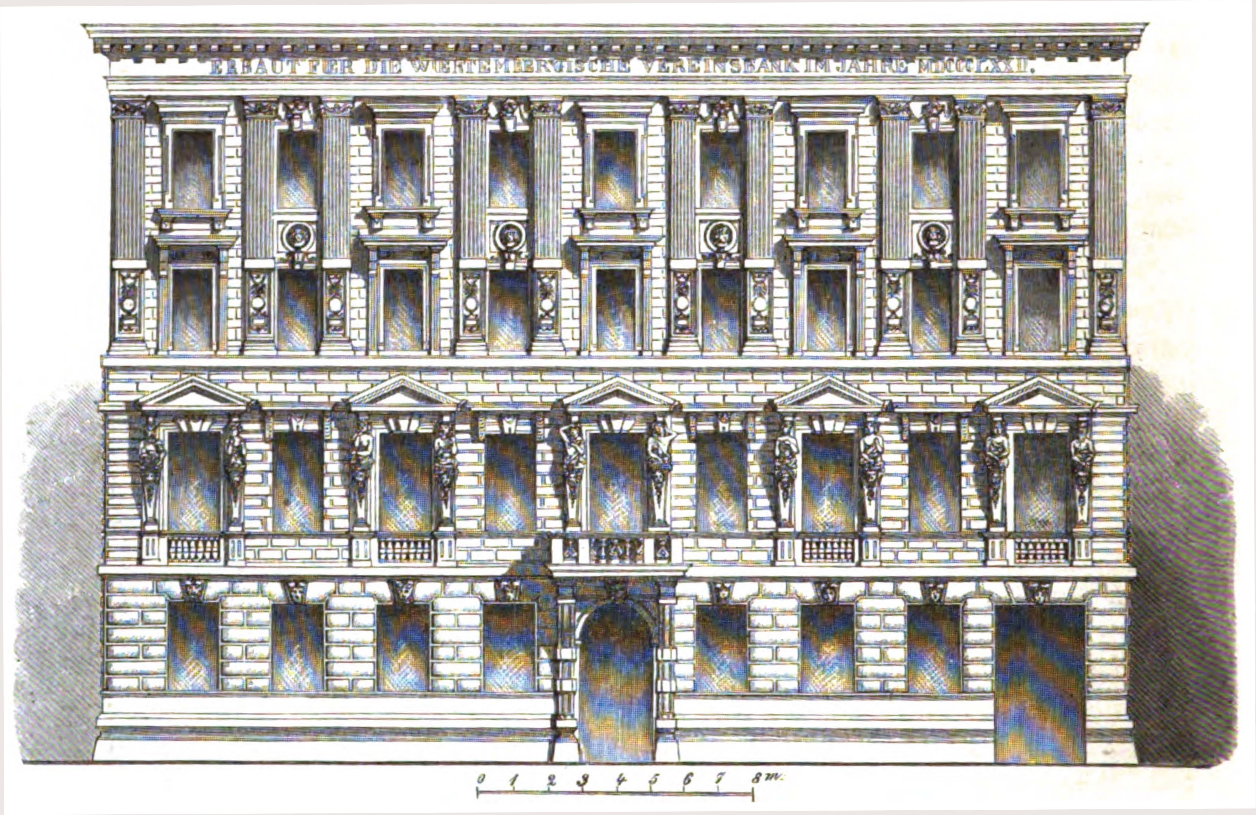 Adolf Gnauth, Württembergische Vereinsbank, Fassade, Stuttgart, Königstraße 36, 1869.